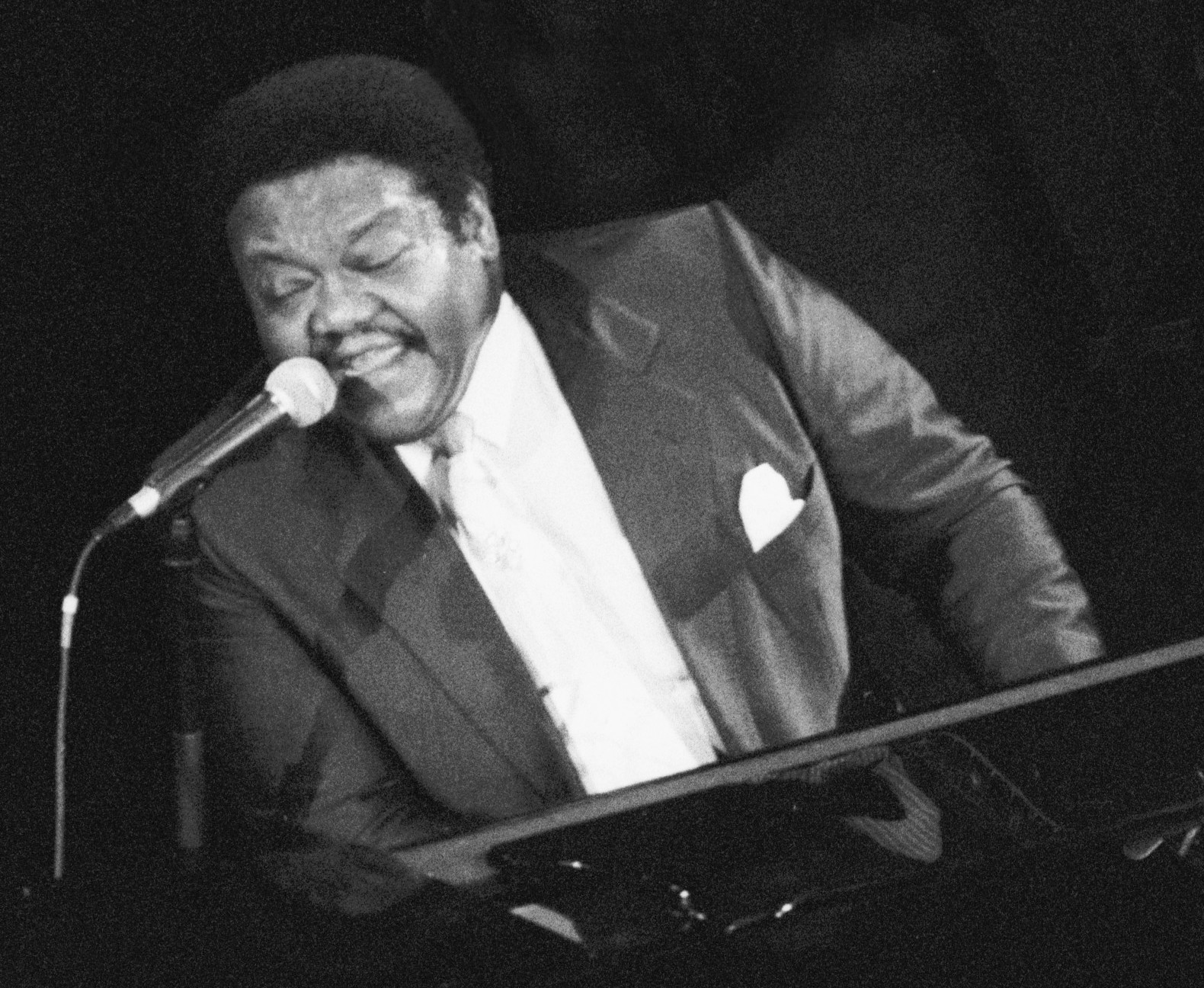 Le chanteur pianiste américain Fats Domino en concert à Deauville (Normandie, France) en 1992.